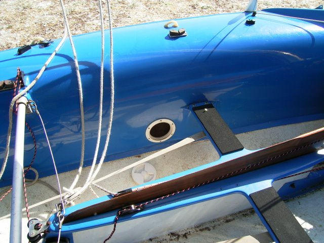 Auftriebstank eines 420ers mit offener Wartungsöffnung - Zuvor bei Wikipedia als "420erTank.JPG" hochgeladen.